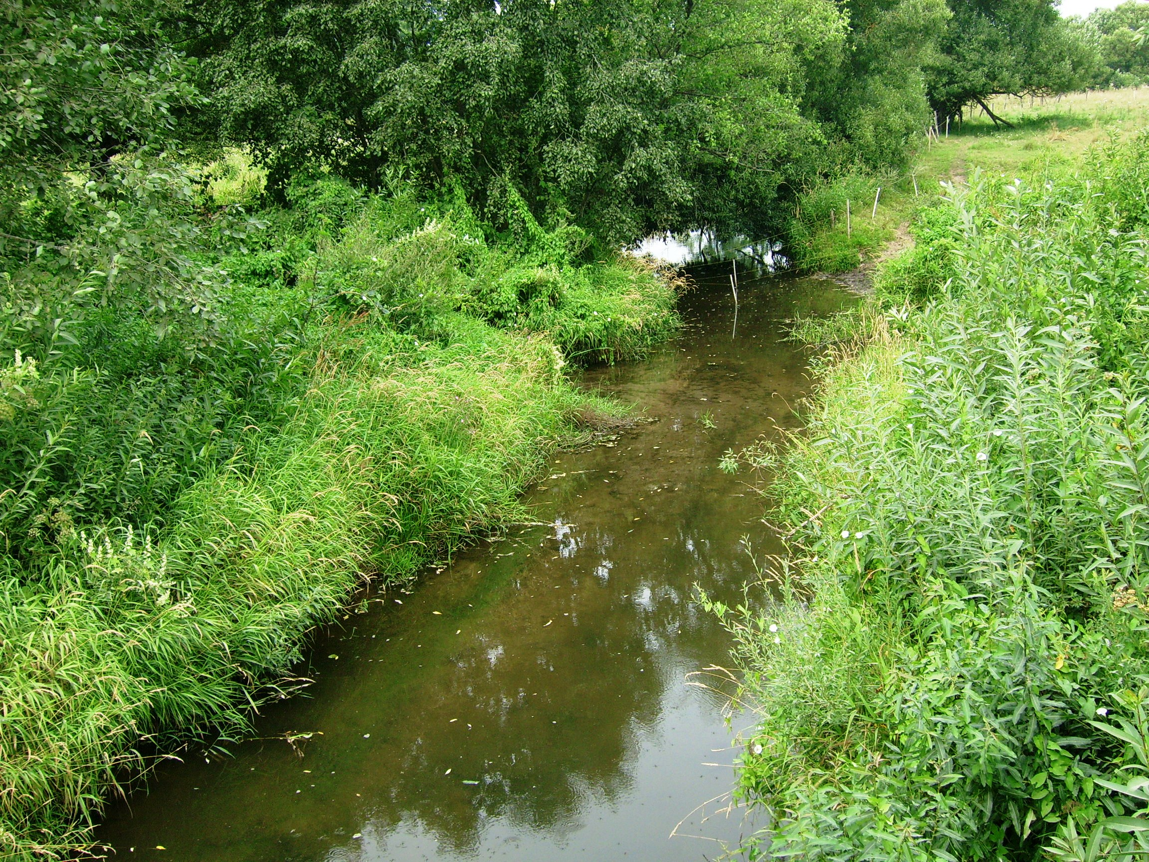 Ežeruona ties Aukštupiais